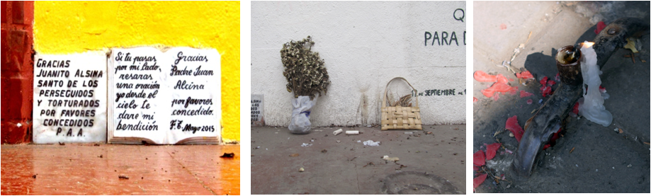 Fotografías de placas “Por Favor Concedido” y vela aun encendida de celebración de Pascua de Resurrección